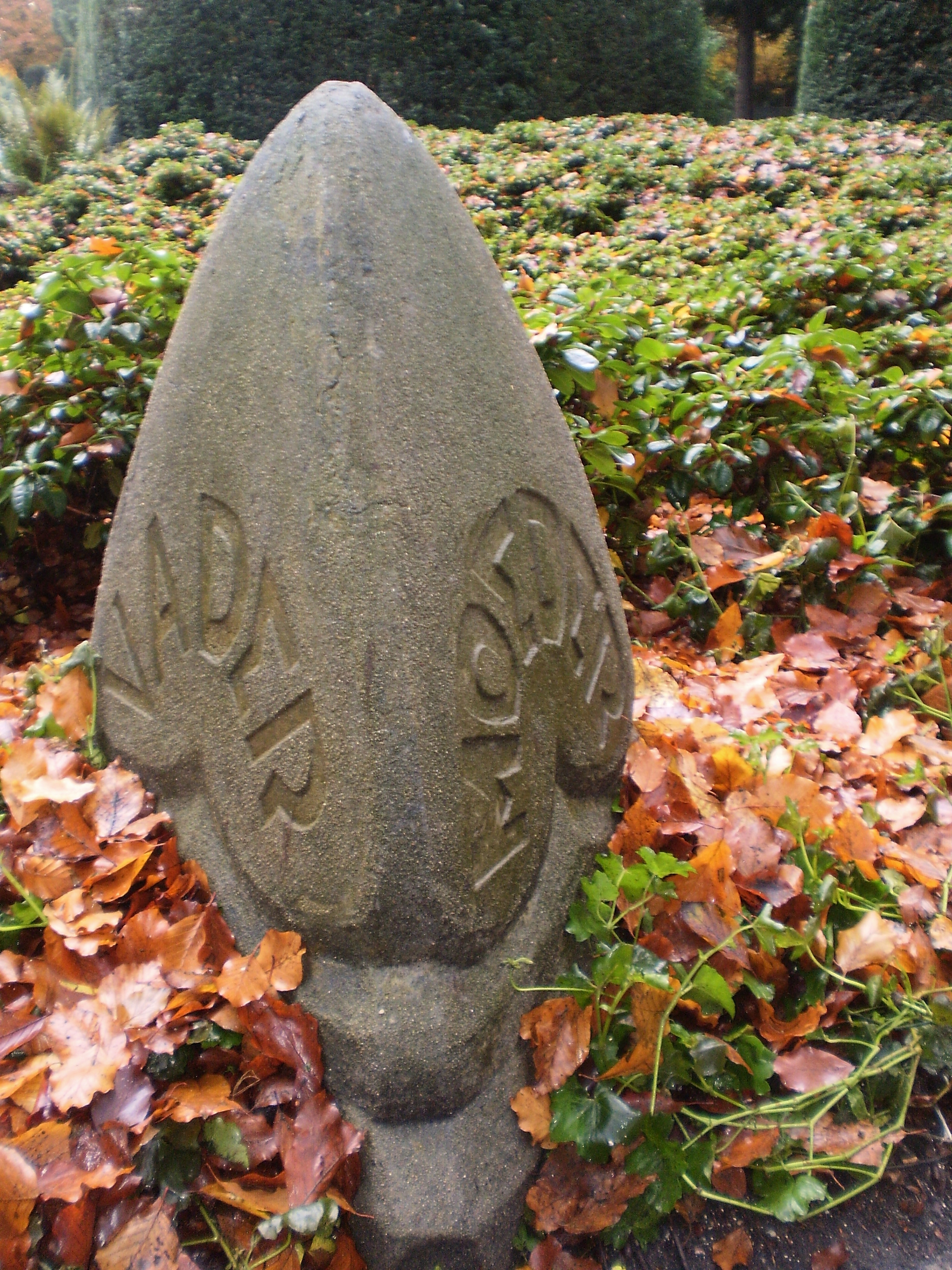 Grafmonument Wolter Bakker op de Nieuwe algemene begraafplaats Baarn